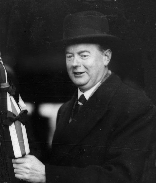 C.N.R. Aamundsen, adm.dir ved Akers mekaniske verksted.